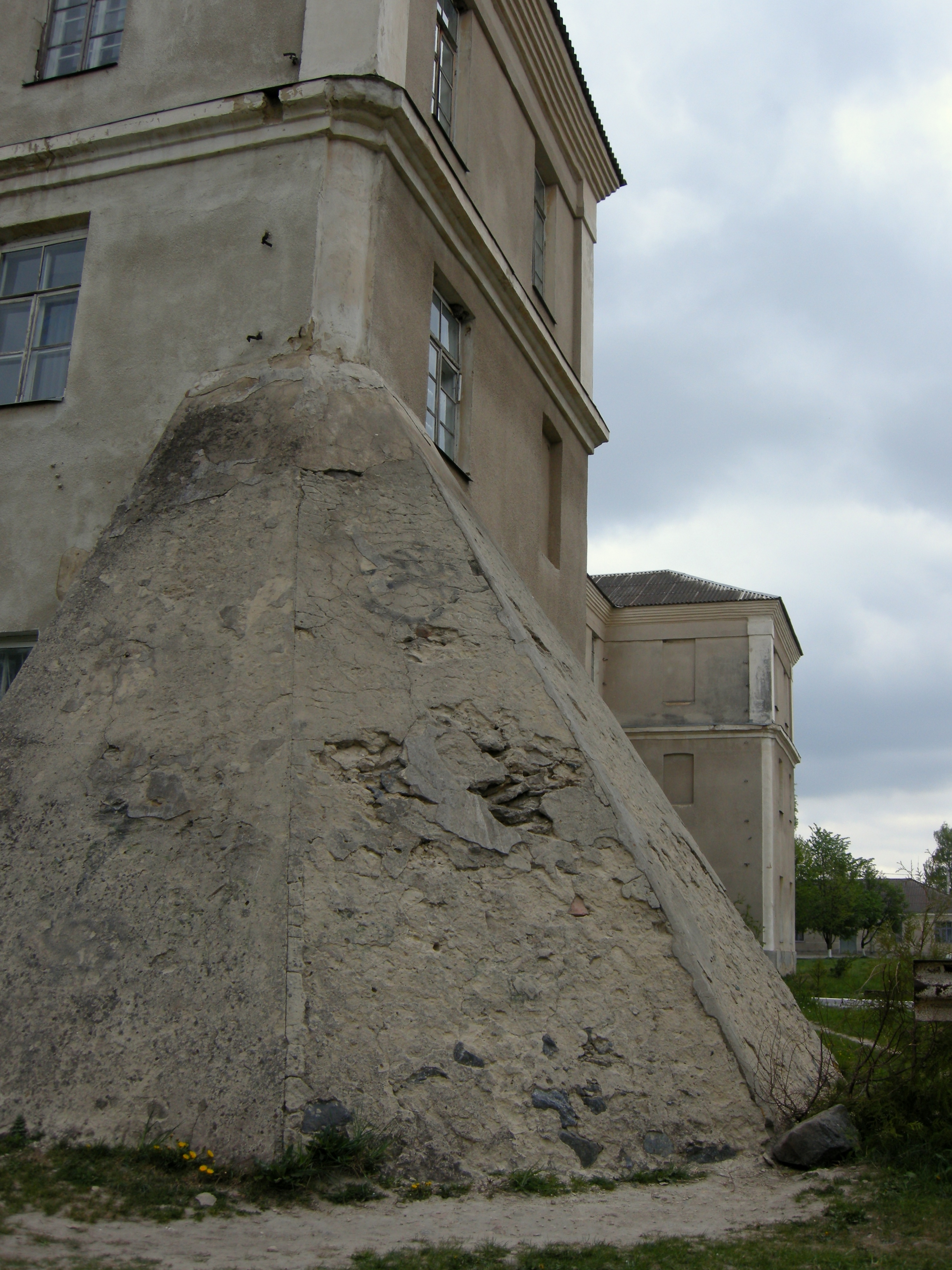 контрфорс (південь-захід)